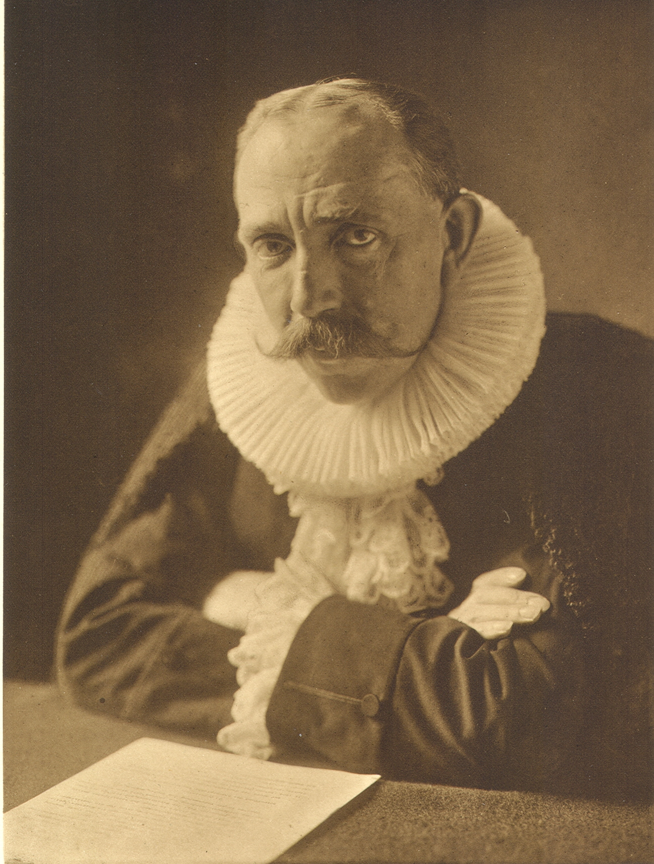 Bruno Louis Schaefer (1860–1945), Hamburger Senator und Finanzamtspräsident